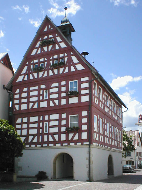 Rathaus von 1602 in Löchgau